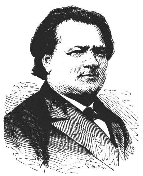 "M. Ricard, sénateur, ministre de l'Intérieur".